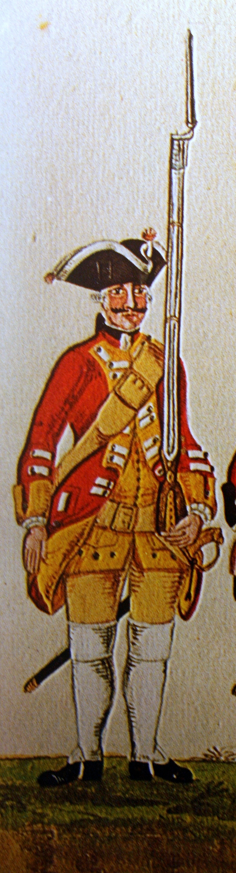 Infanterieregiment No. 5 A von Laffert der kurhannoverschen Armee während des Siebenjährigen Krieges.